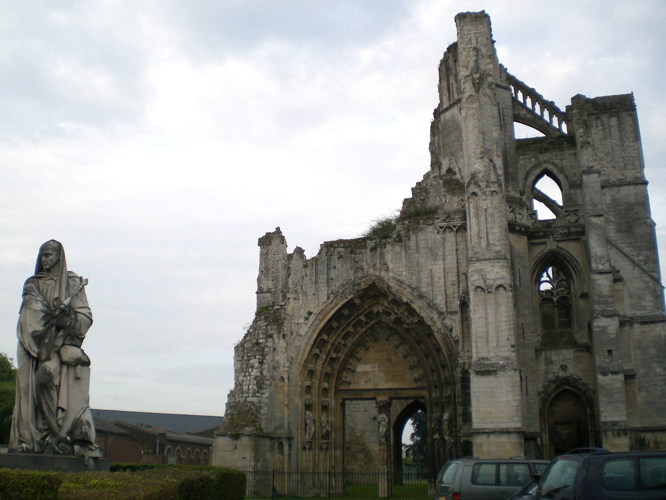 Ruines de Saint-Bertin à Saint-Omer.